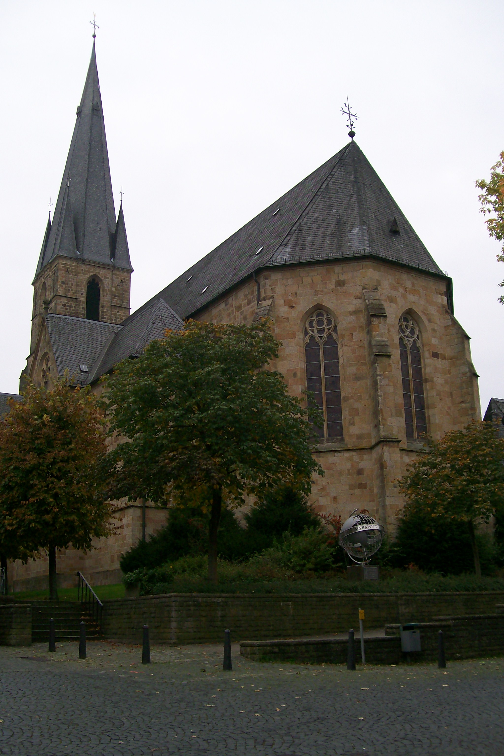 St. Jakobus der Ältere (Bad Iburg), Kirche in Bad Iburg, 1905 im Stil der Neugotik erbaut